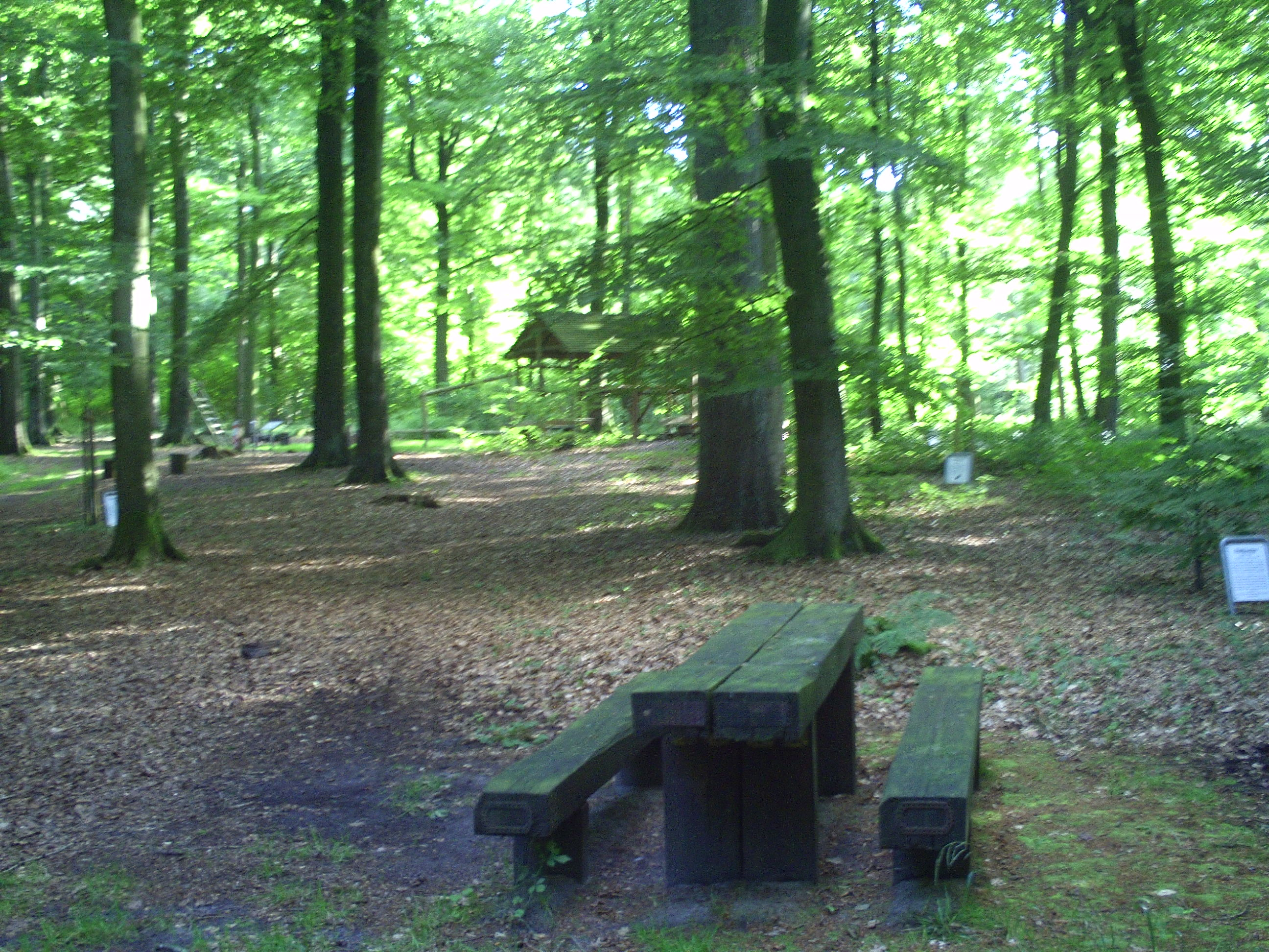 Impression der Freizeitlichtung im Klueser Wald